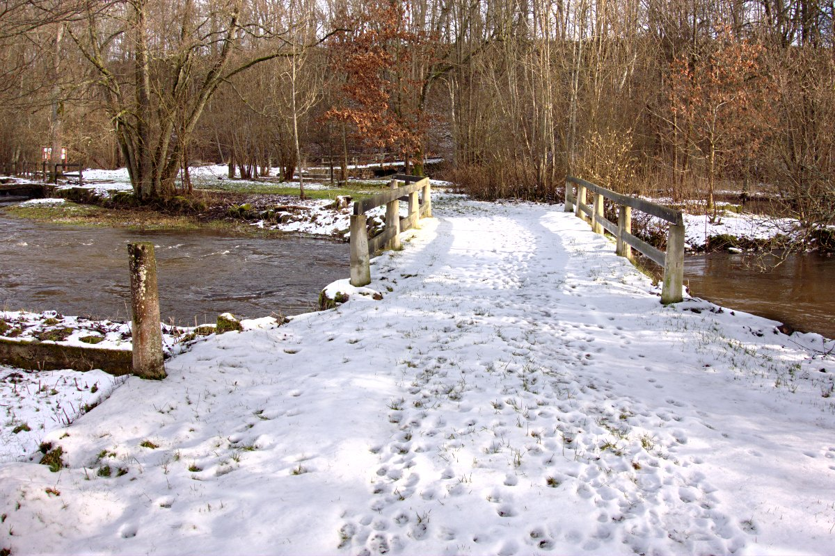 En bro som finns på naturreservatet Billinge Mölla i Skåne.